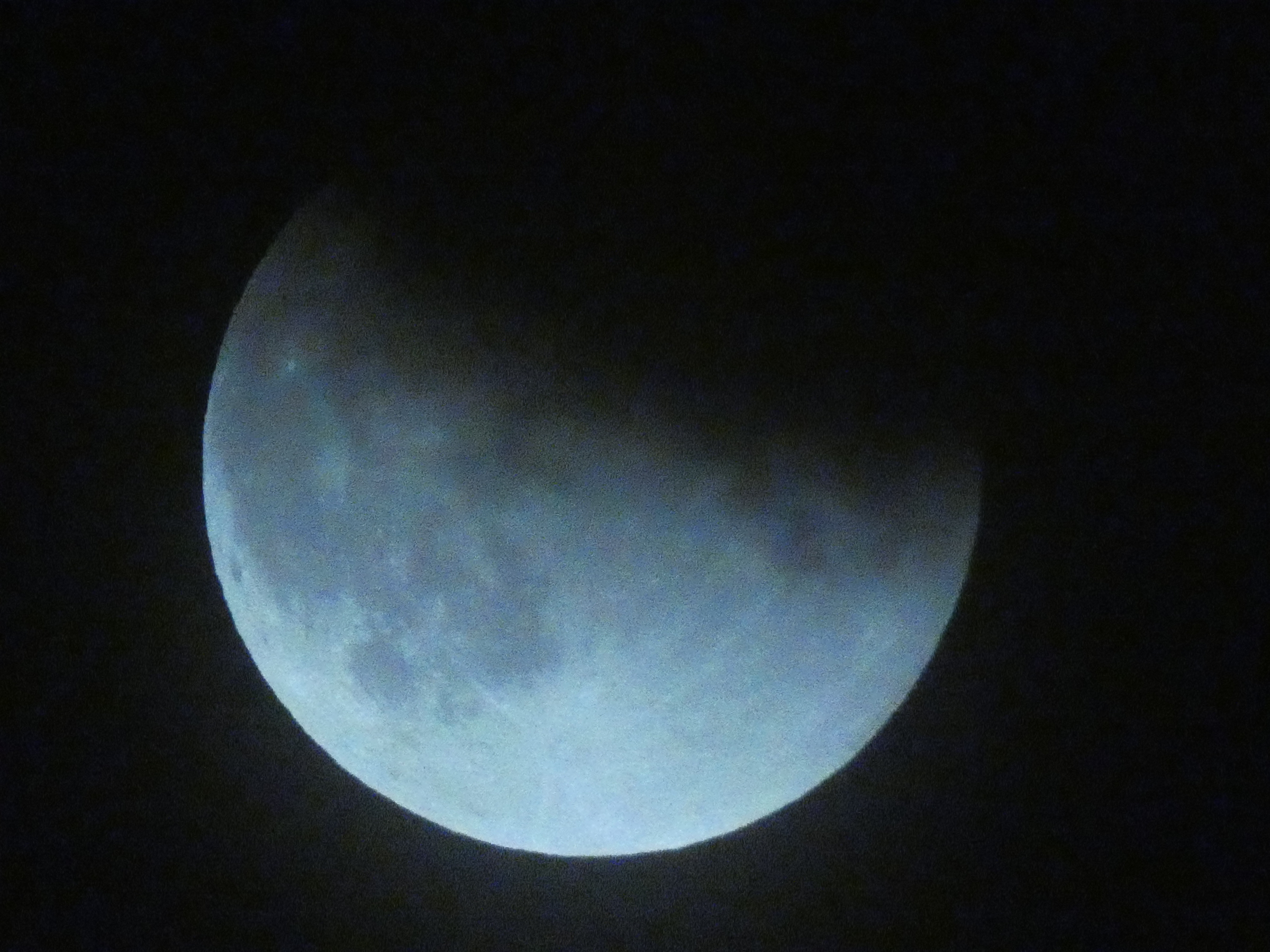 Eclipse lunar del 16 de julio del 2019 en Logroño (España). Fotografiado desde el monte Cantabria a las 00:32 del 17 de julio del 2019.